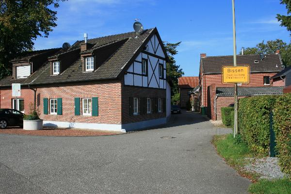 Ortsansicht in Wegberg-Bissen